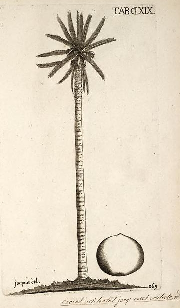 Cocos aculeatus (Acrocomia aculeata) :Nicolaus Iosephus Jacquin, Selectarum stirpium Americanarum historia pl. 169